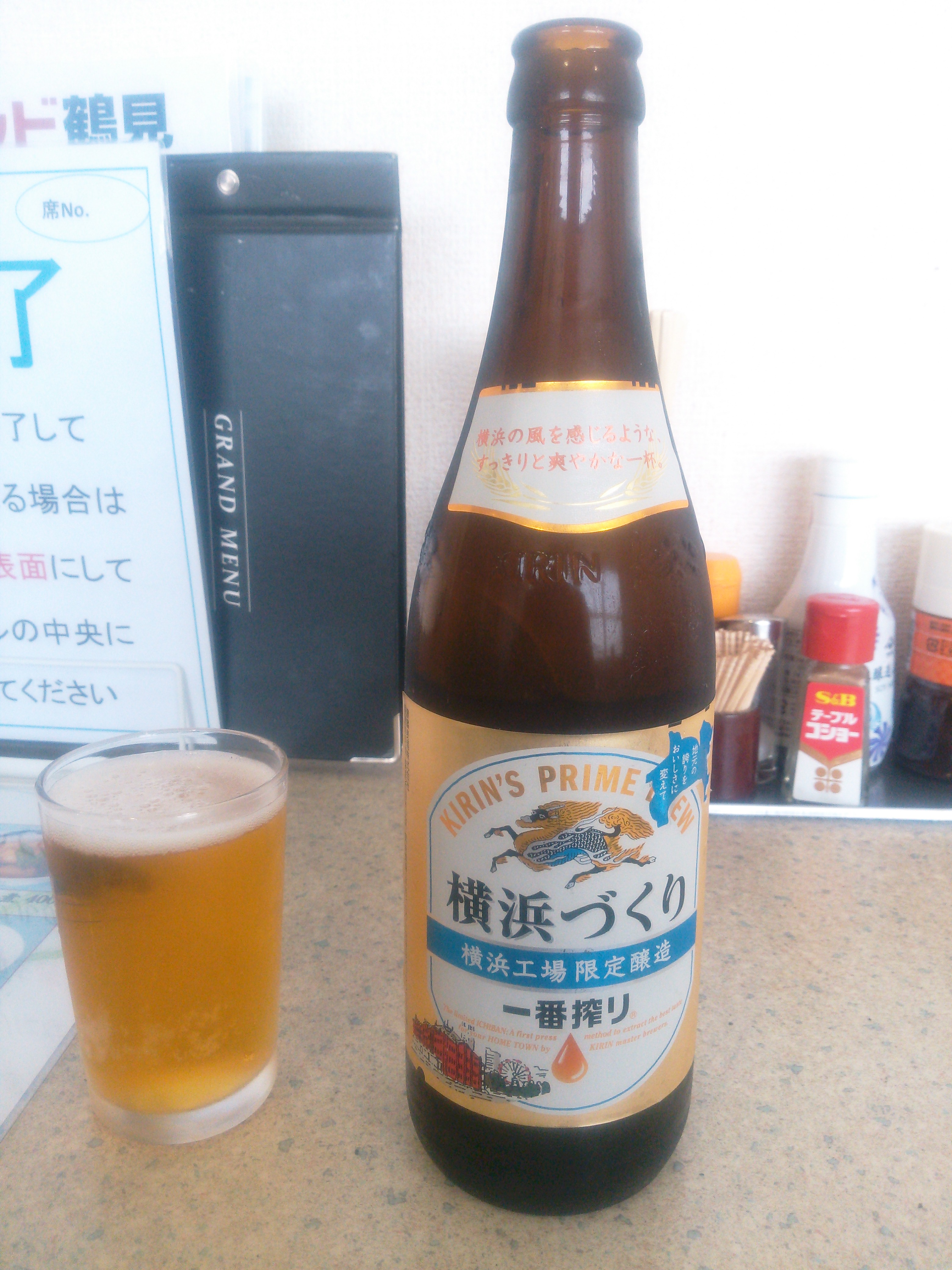 キリン一番搾り生ビール 横浜工場限定醸造 大瓶